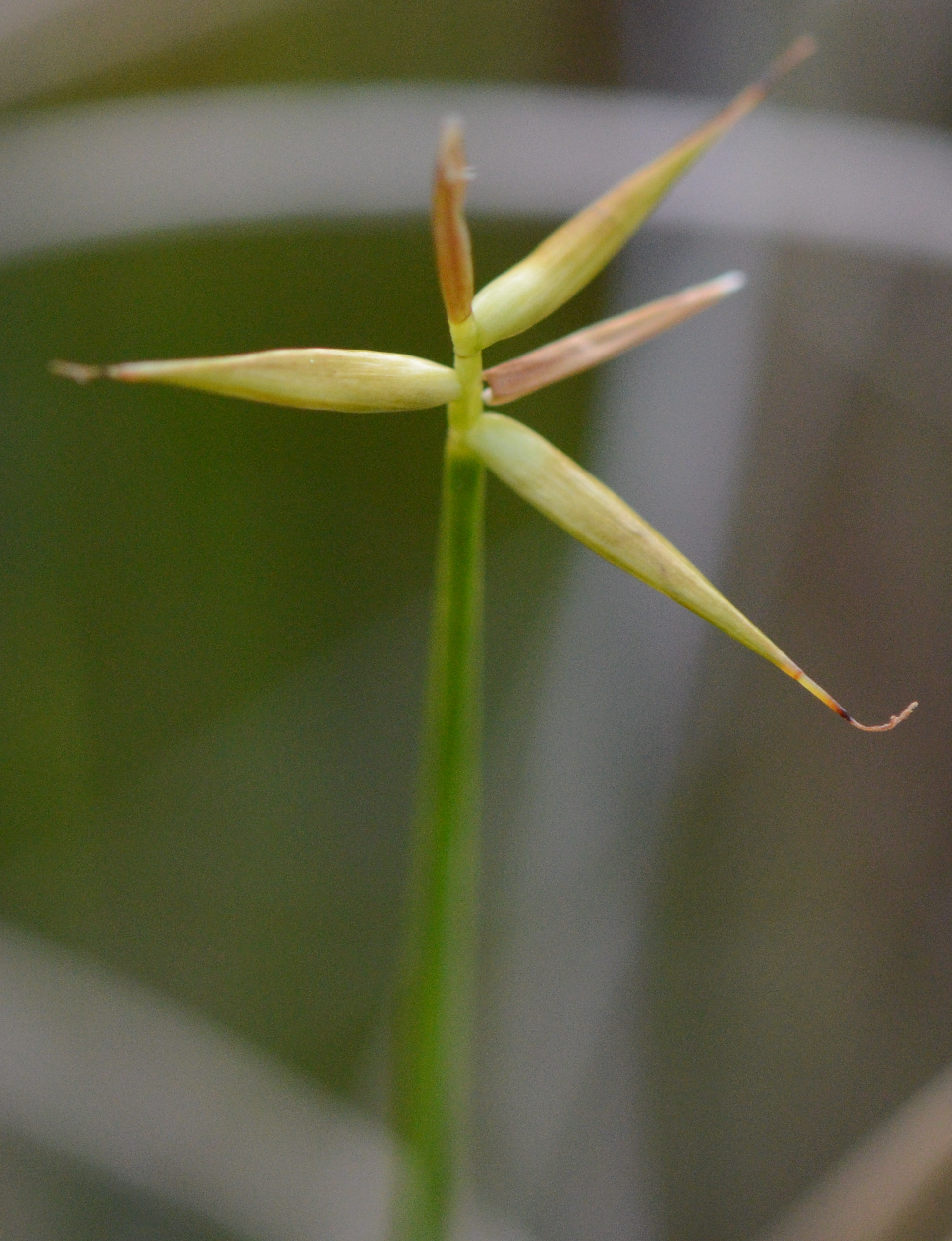 Sveltstarr